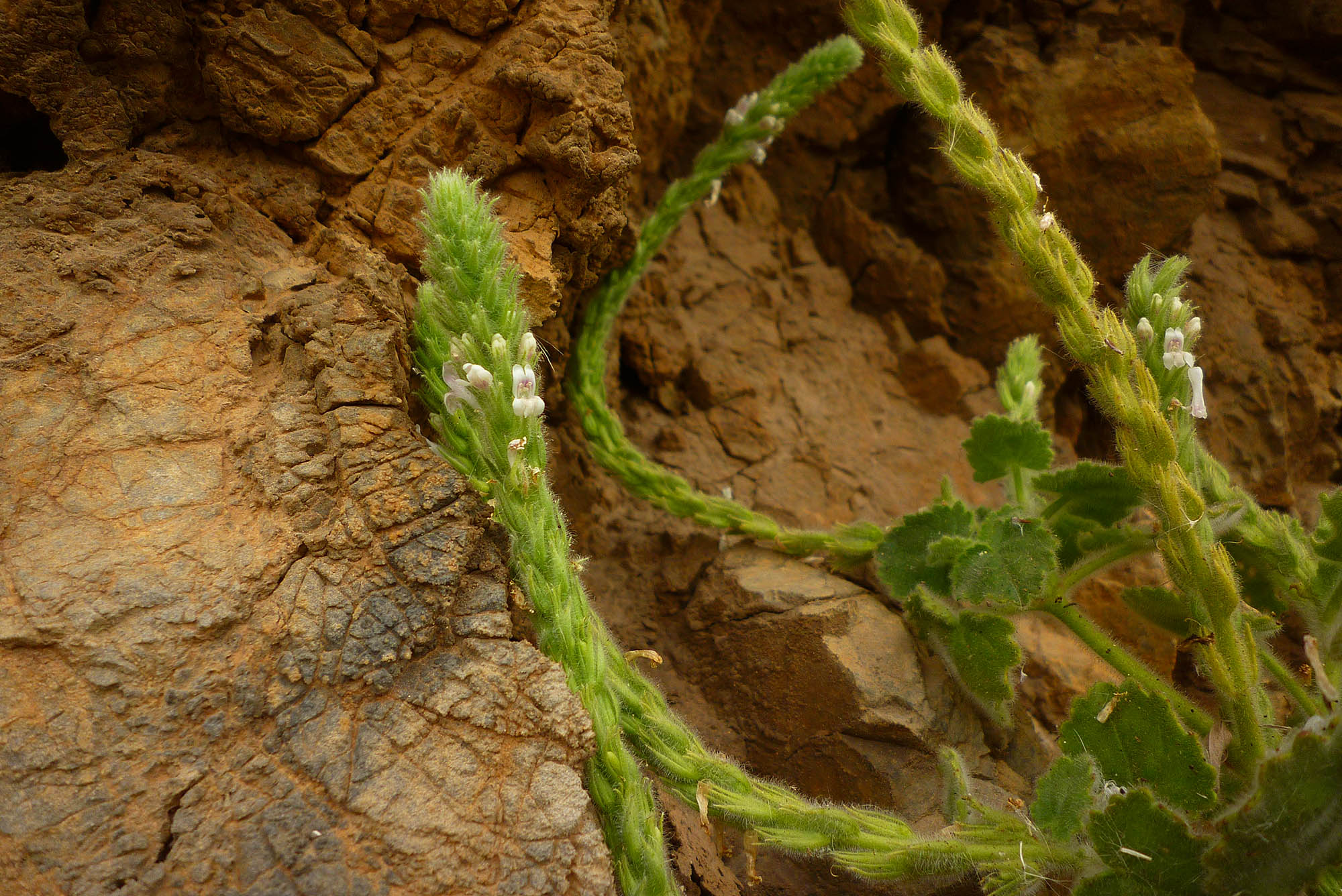 Lafuentea rotundifolia, planta endémica del sureste de España, en el Monte de San Julián de Cartagena (España).